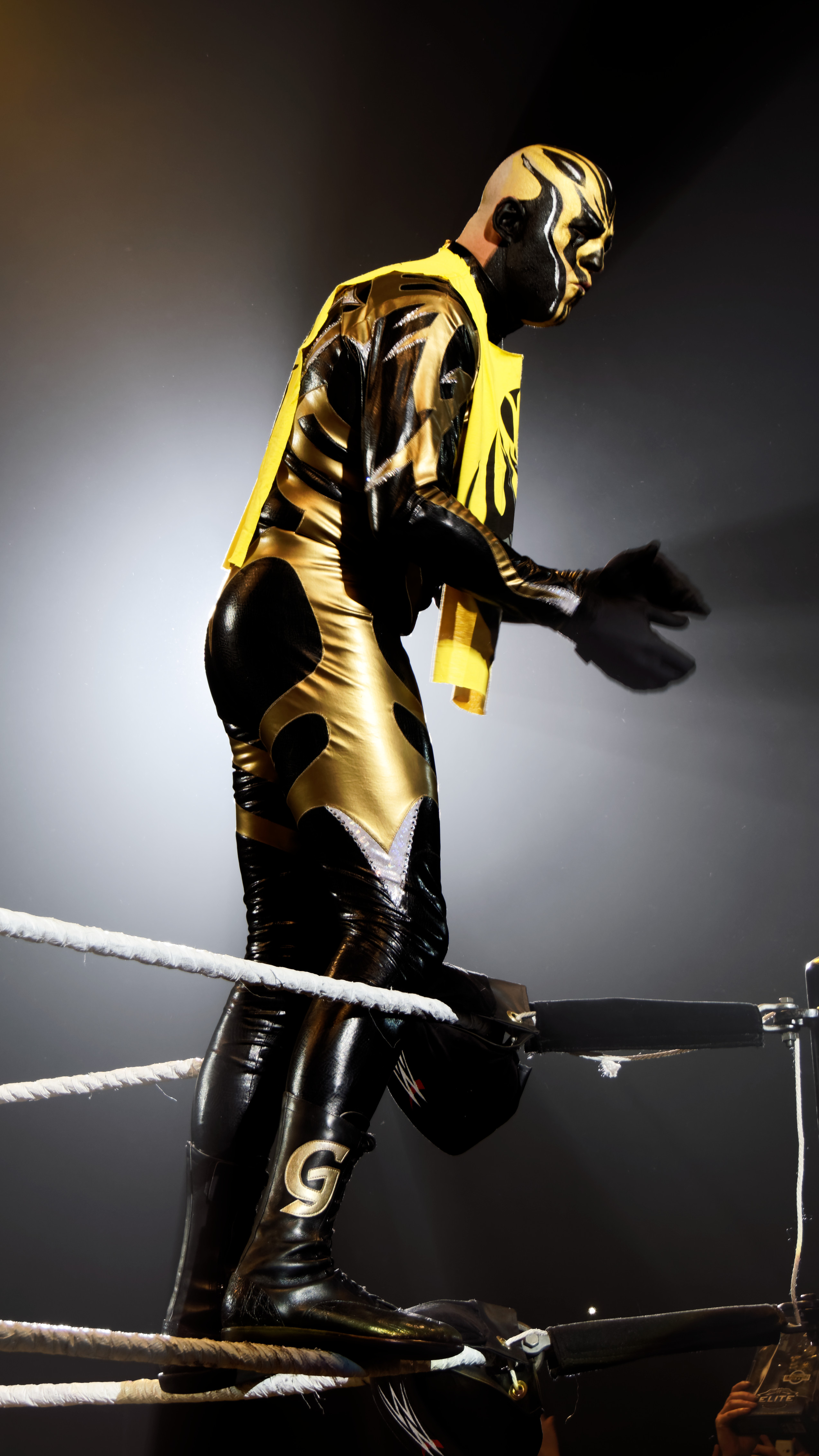 WWE Live@Lotto Arena - Antwerpen